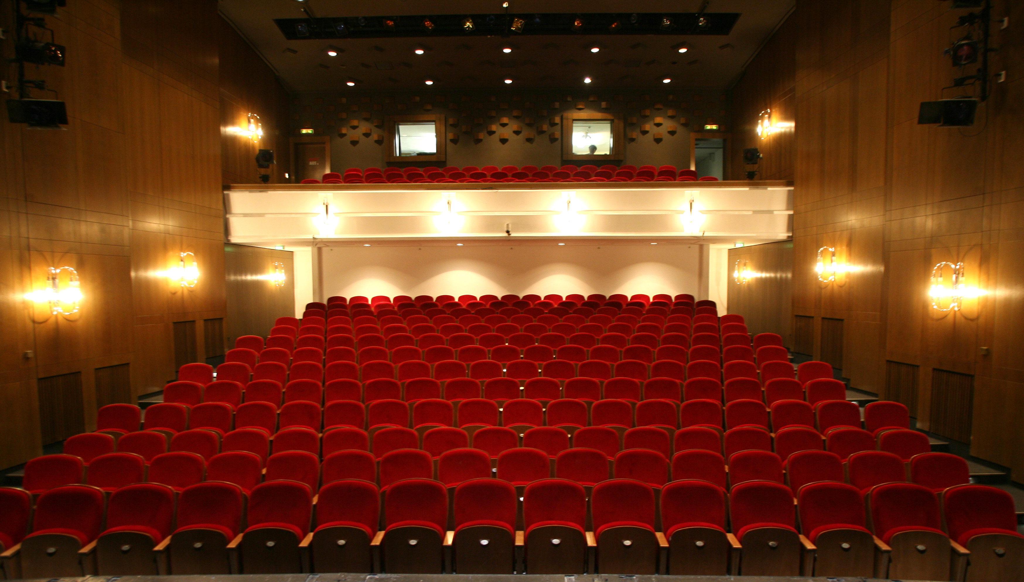 295 Sitzplätze für ein schönes Theatervergnügen